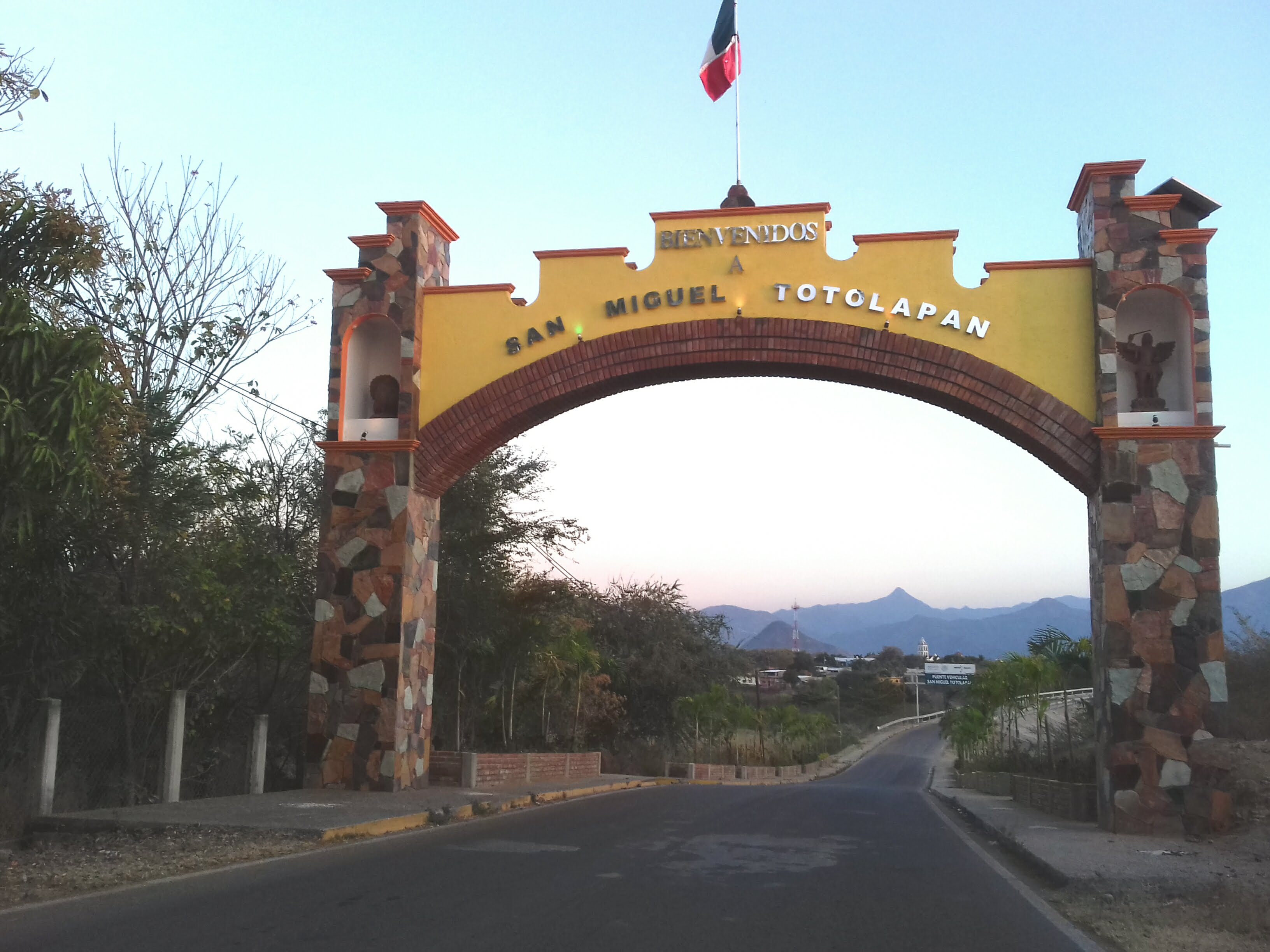 San Miguel Totolapan